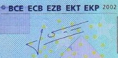 20€ Trichet